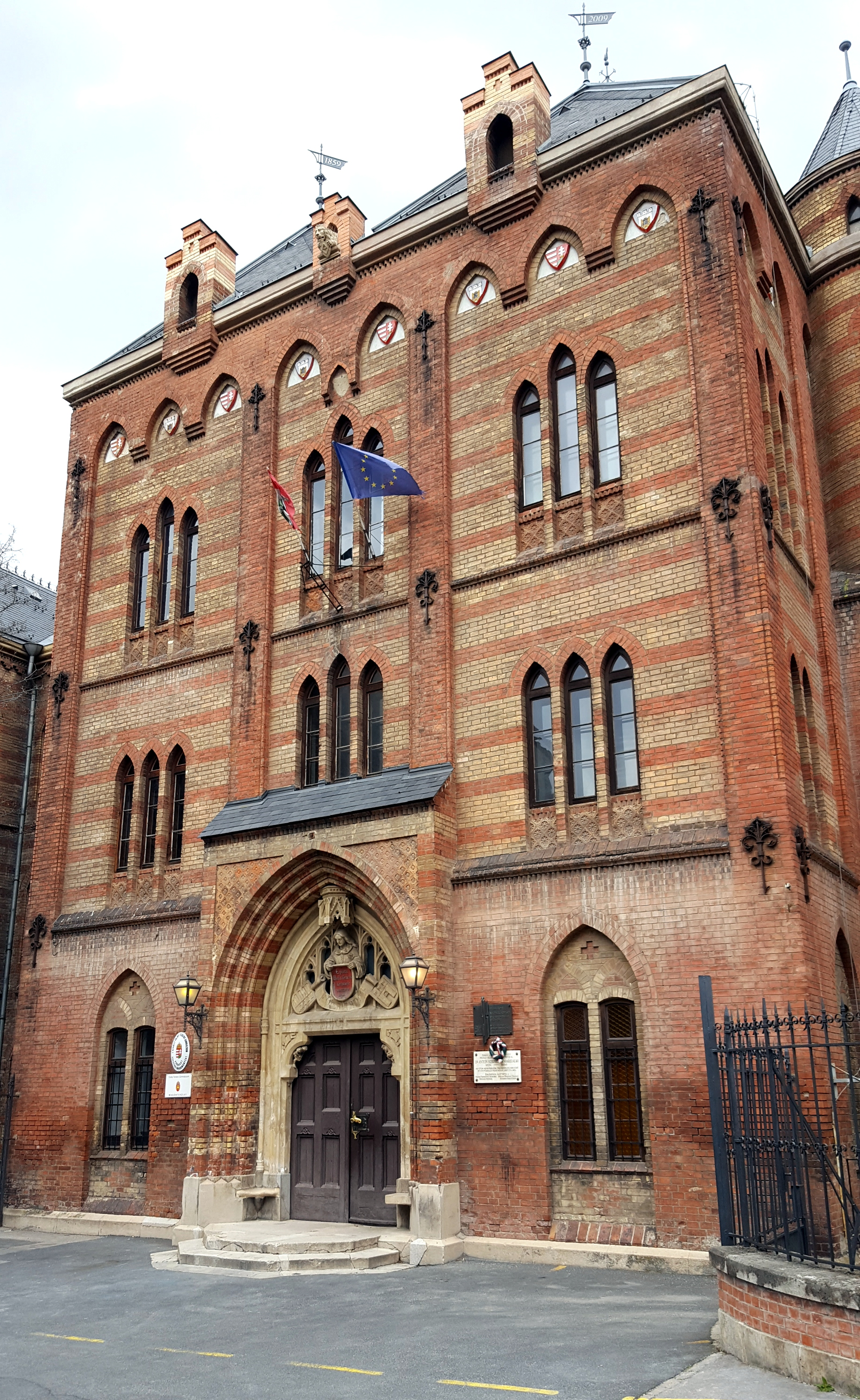 Toldy Ferenc Gimnázium (Budapest)